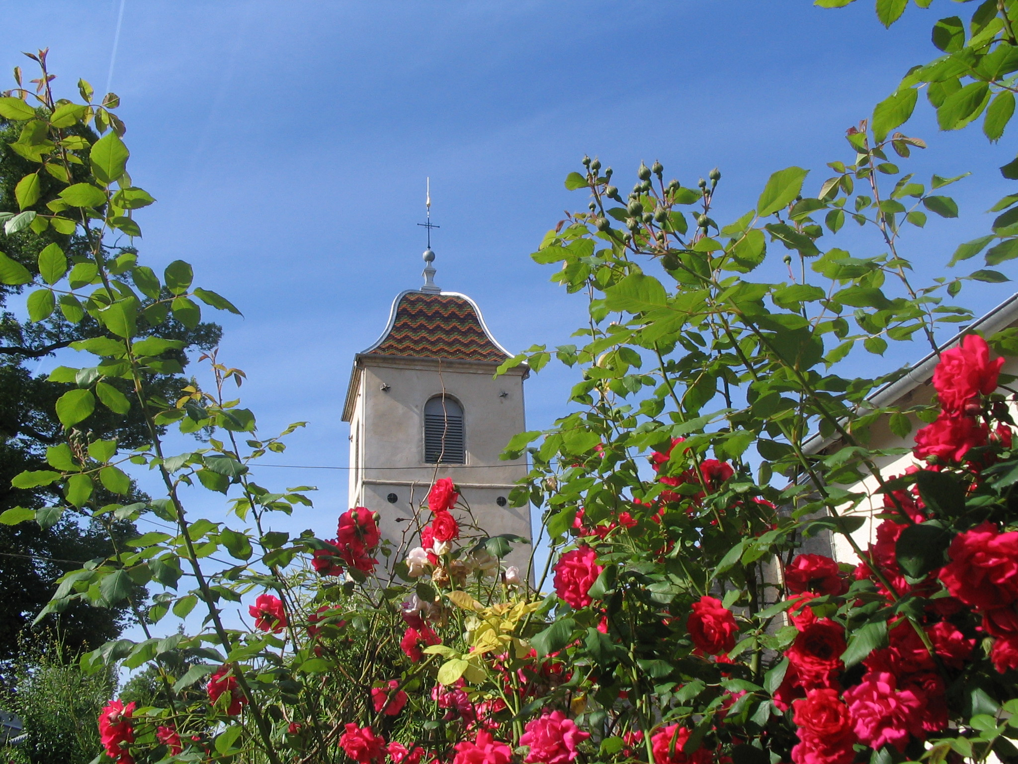 Clocher de Velle le Chatel